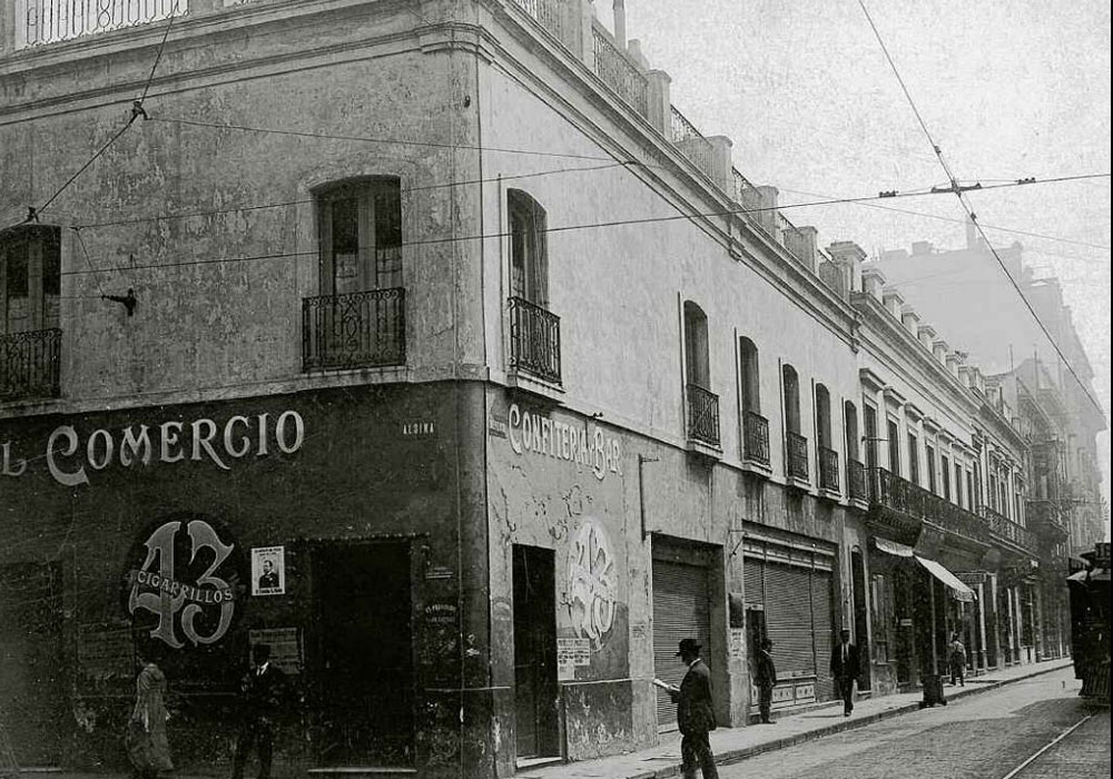 La casa de los Altos de Elorriaga, en la esquina noroeste de las calles Adolfo Alsina y Defensa. Buenos Aires, Argentina.